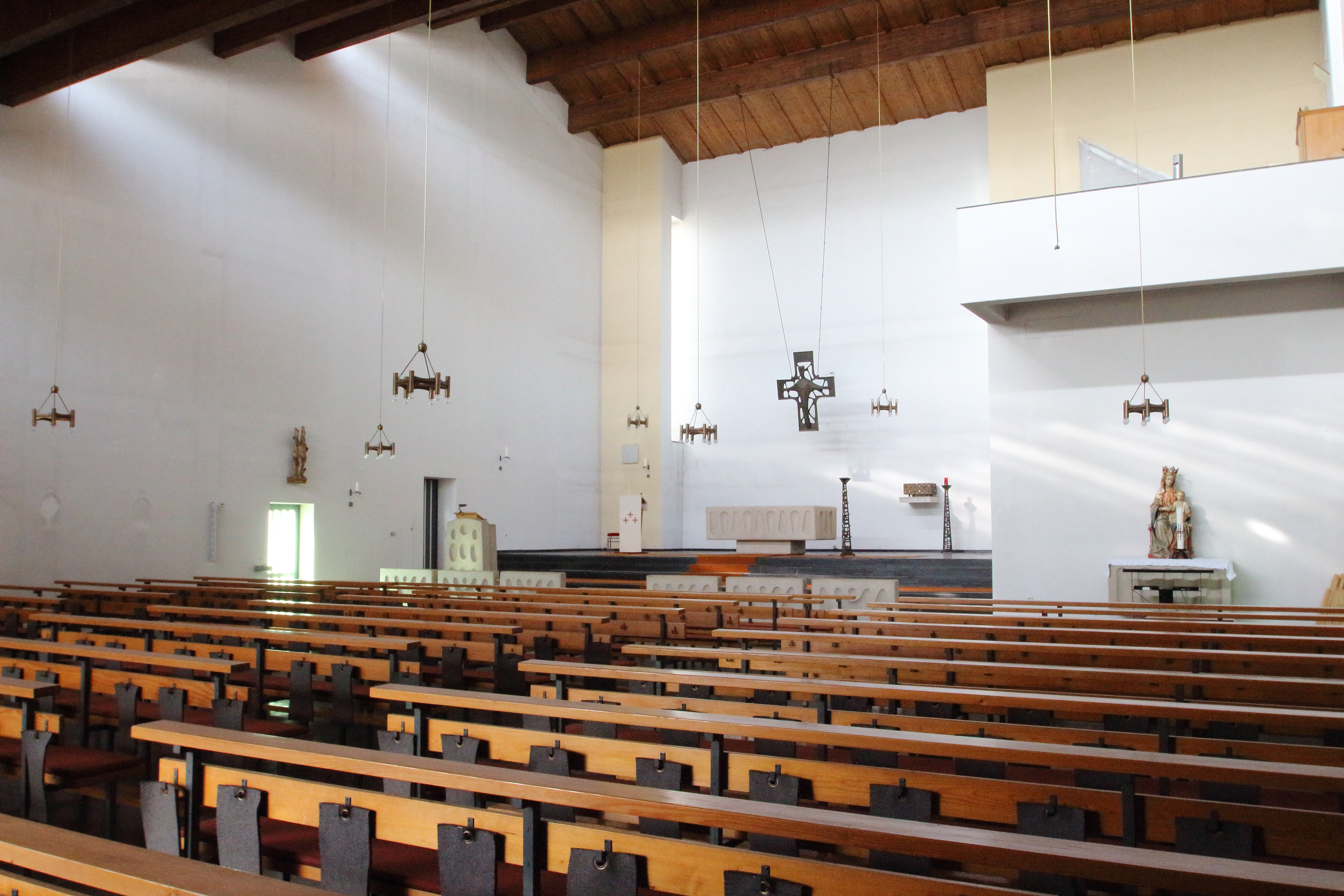 Die 1963 erbaute Kirche St. Martin war bis 2017 kath. Pfarrkirche von Martinsthal im Rheingau.